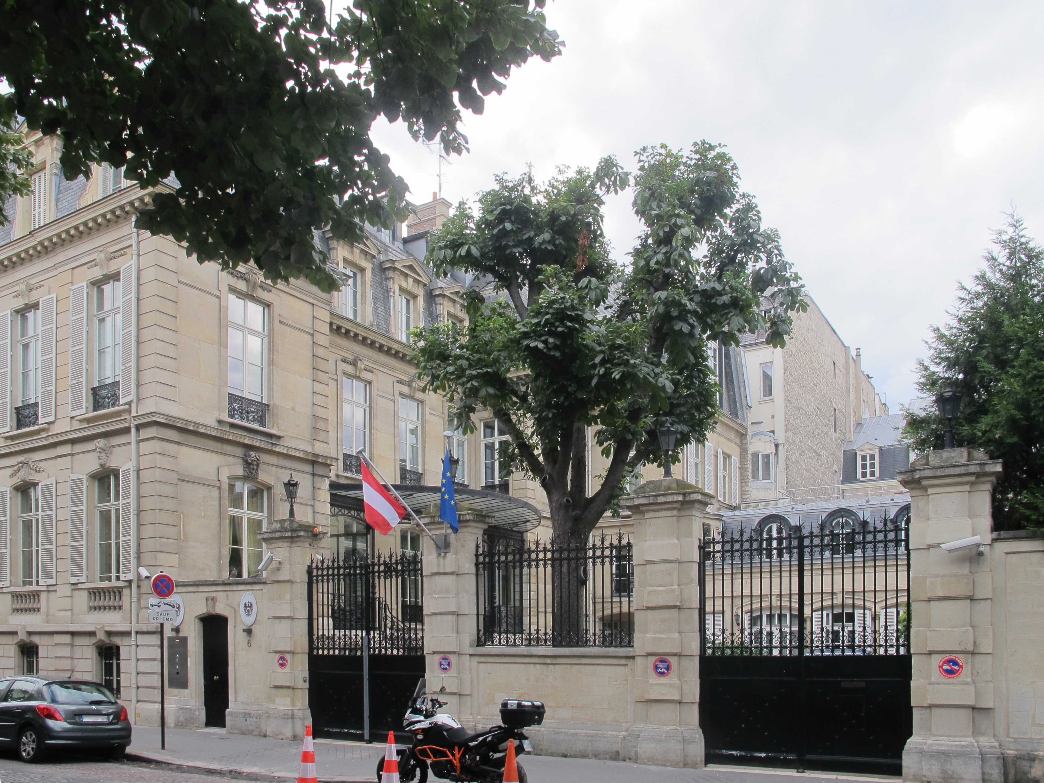 Ambassade d'Autriche en France, 6 rue Fabert (Paris, 7e).